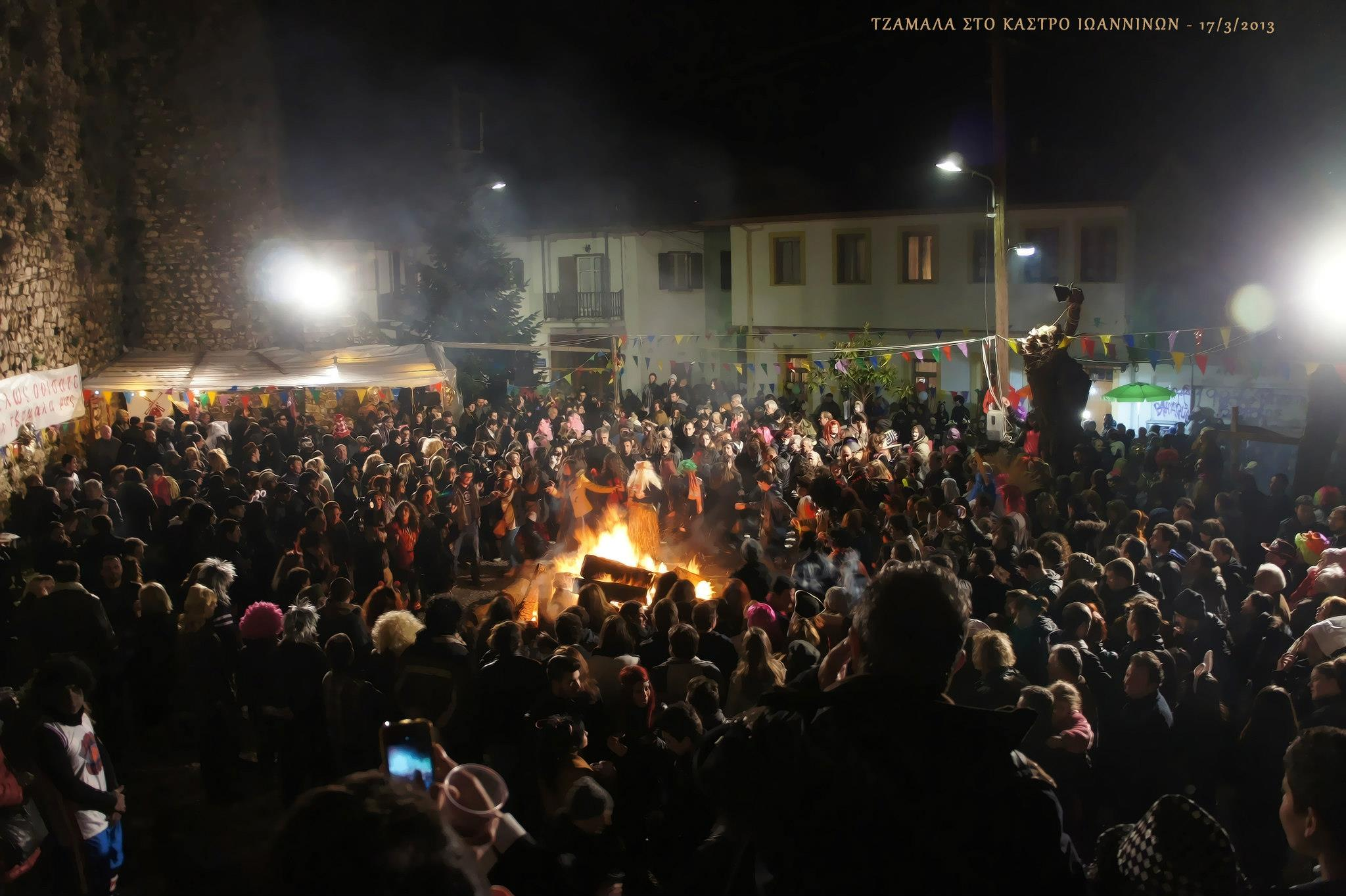 Τζαμάλες. Τζαμάλα στο Κάστο Ιωαννίνων 2013